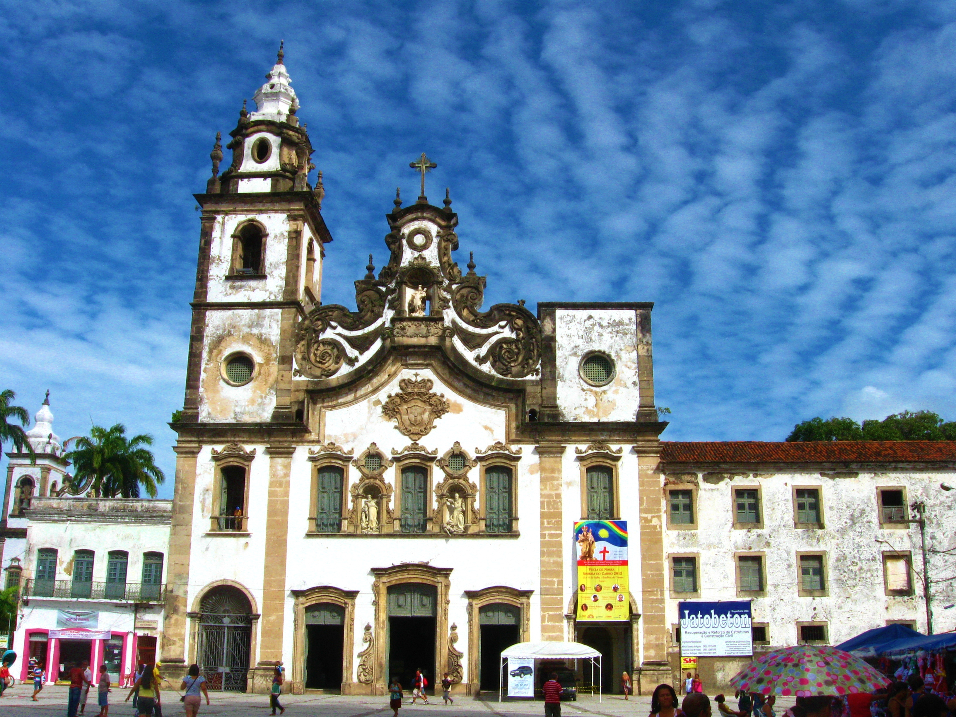 Igreja da Ordem Terceira de Nossa Senhora do Carmo